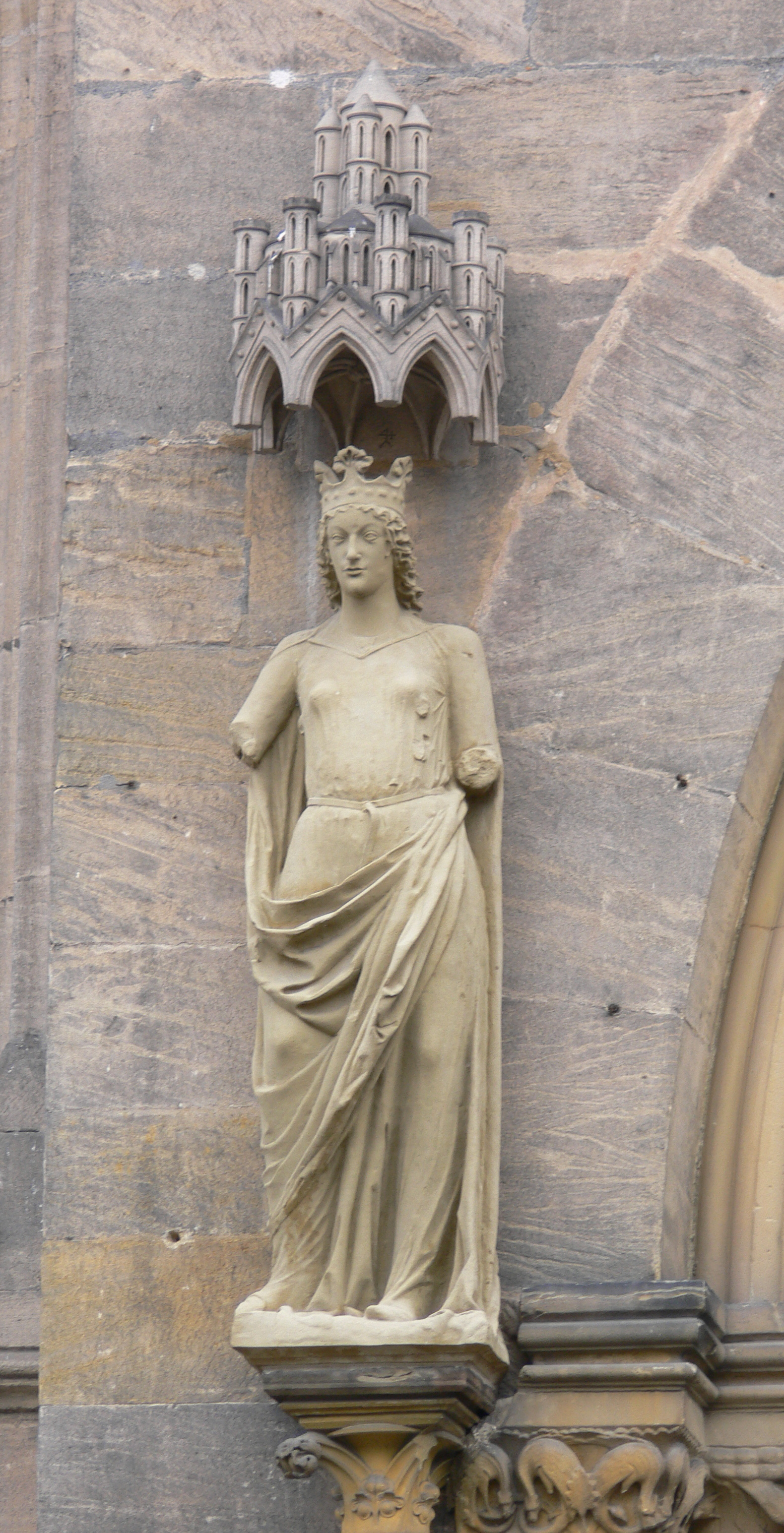 Bamberg, Dom St. Peter und St. Georg Fürstenportal: Ecclesia